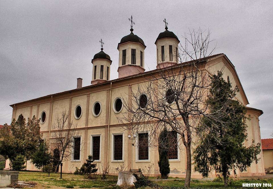 църква лом